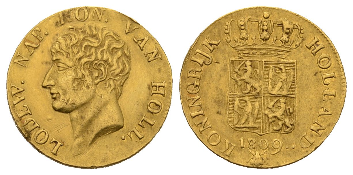 Dukaten Münze Königreich Holland auf 1809